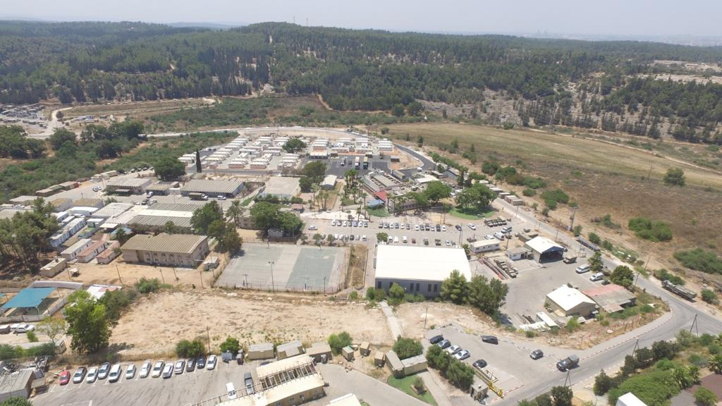 היום (ראשון), התקיים טקס חנוכת בית הספר לקומנדו ב"מתקן אדם" בראשות מפקד זרוע היבשה, אלוף יואל סטריק, מפקד פיקוד המרכז, אלוף תמיד ידעי, מפקד "עוצבת האש", תא״ל ירון פינקלמן, מפקד "עוצבת הקומנדו", אל״ם קובי הלר, מפקדים נוספים ולוחמי העוצבה.